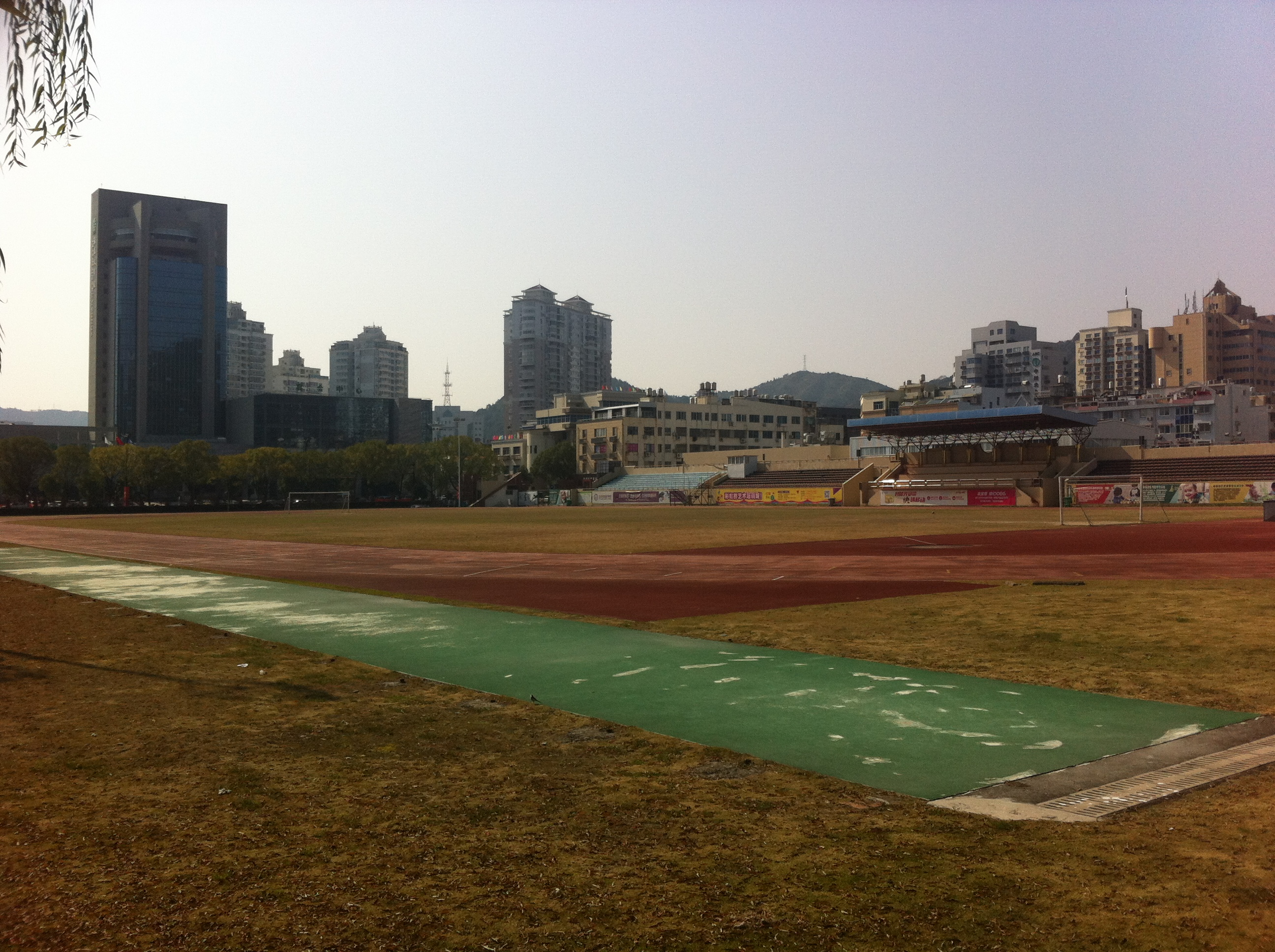 中文（中国大陆）: 玉环市体育中心